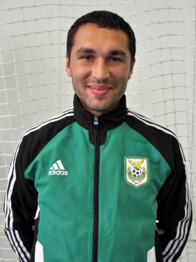 Семизьян Александр Михайлович